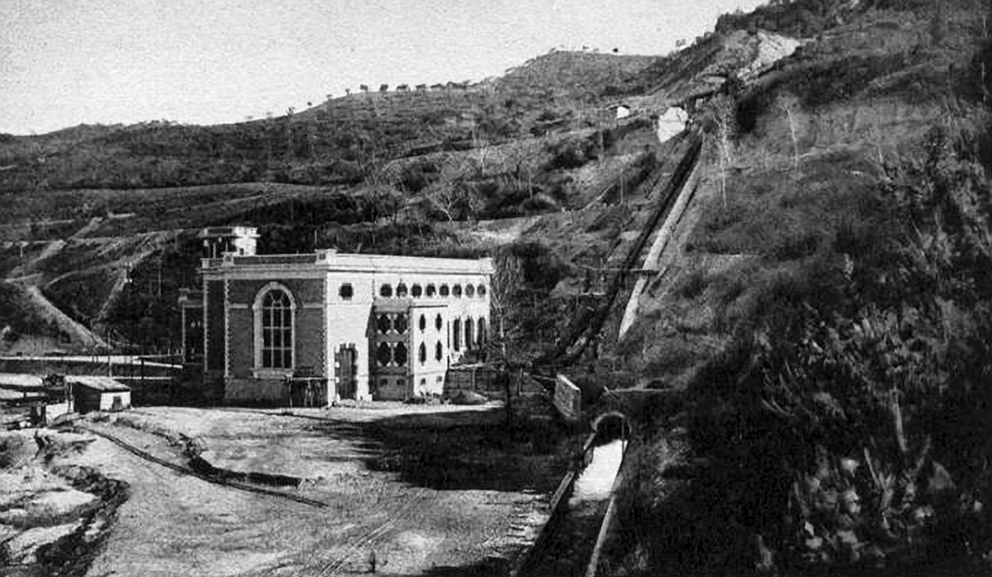 Fotografia della centrale idroelettrica di Farfa, in provincia di Rieti (prospetto sud, con il canale di scarico) durante la sua costruzione, nel 1922.